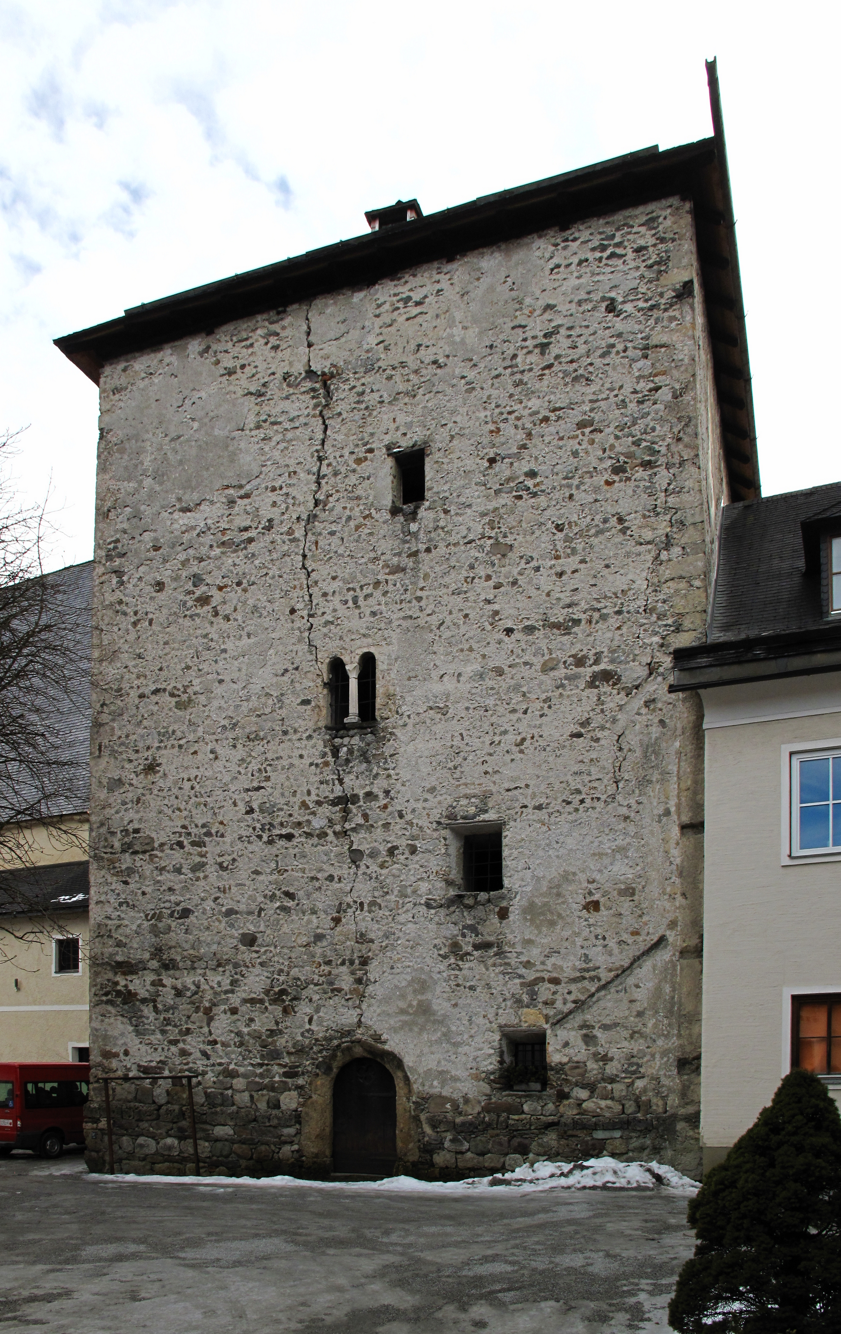 Kastenturm, 5500 Bischofshofen, Rathausplatz 5